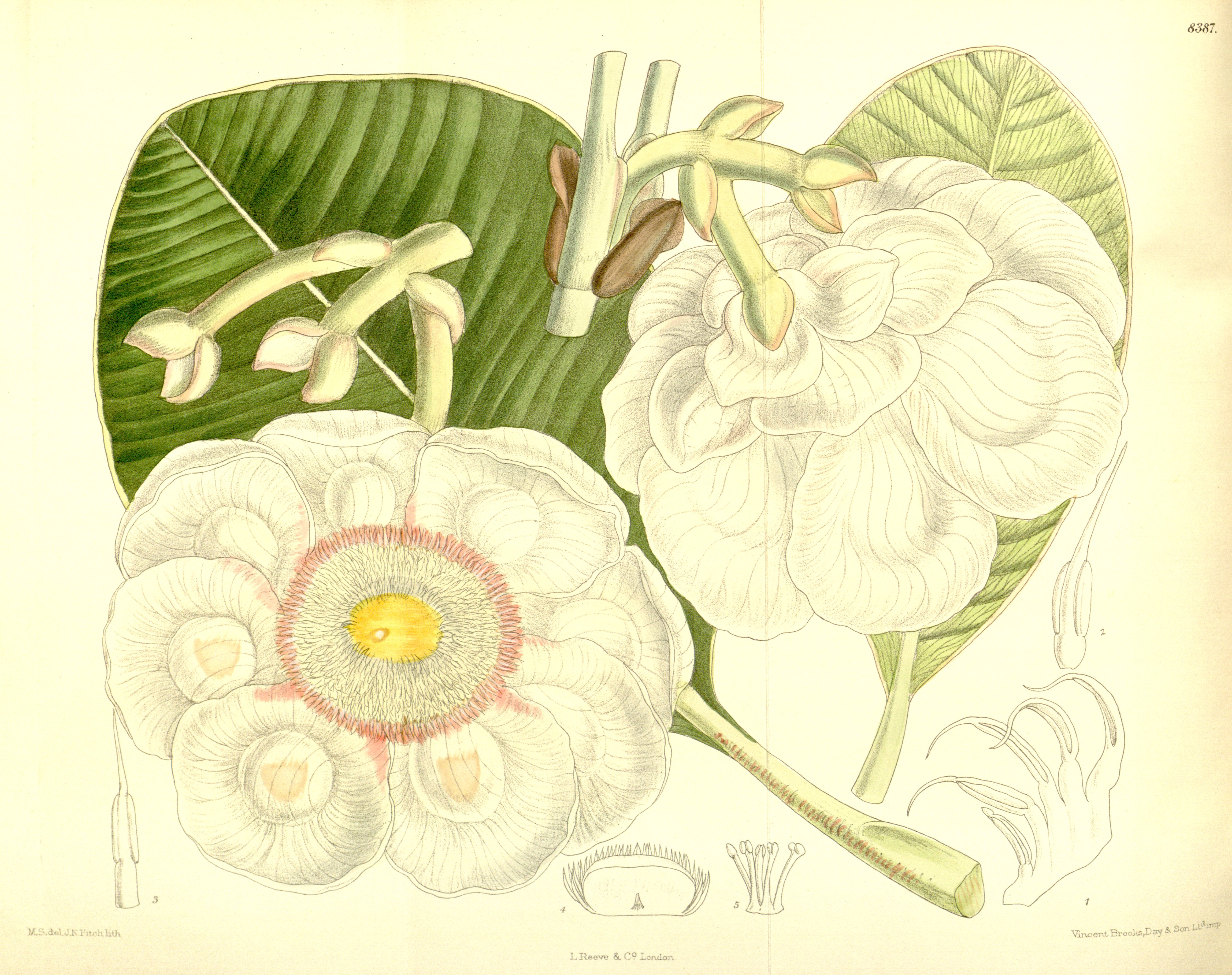 Clusia grandiflora, Clusiaceae